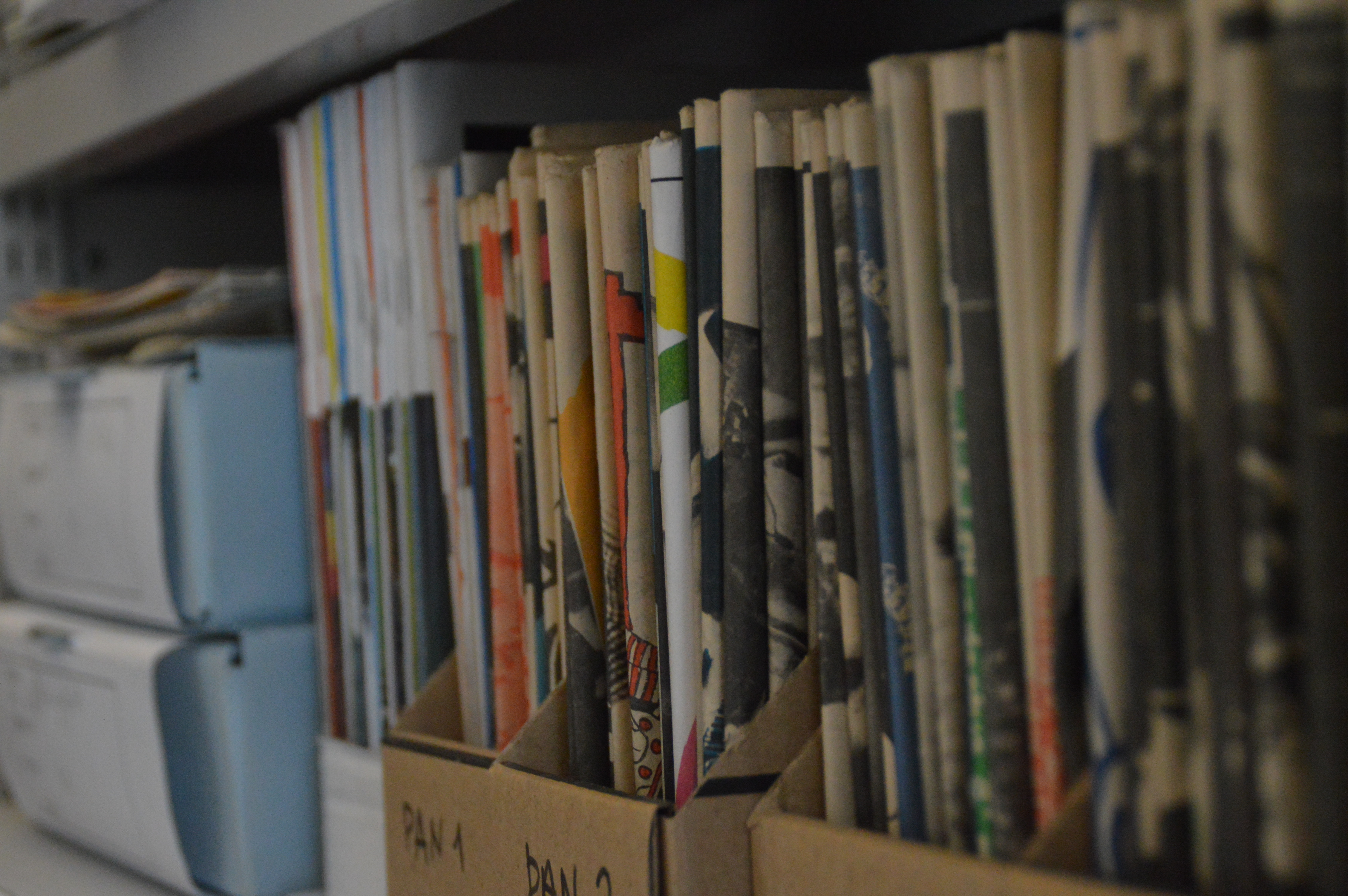 Bibliothek Qwien1